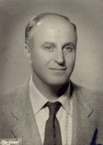 Nejdet Sançar